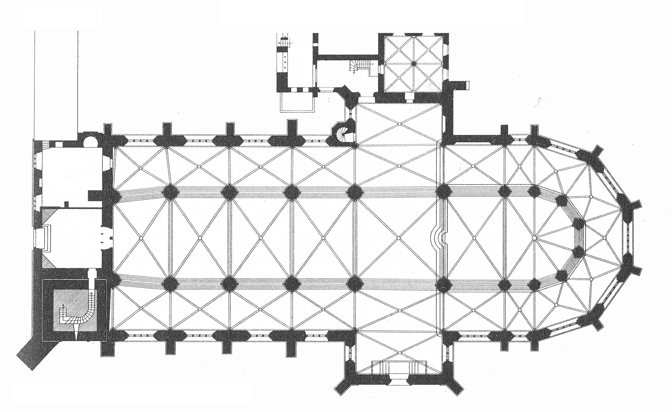 Dom zu Verden (Niedersachsen), Grundriss